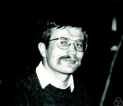 Foto di Étienne Fouvry